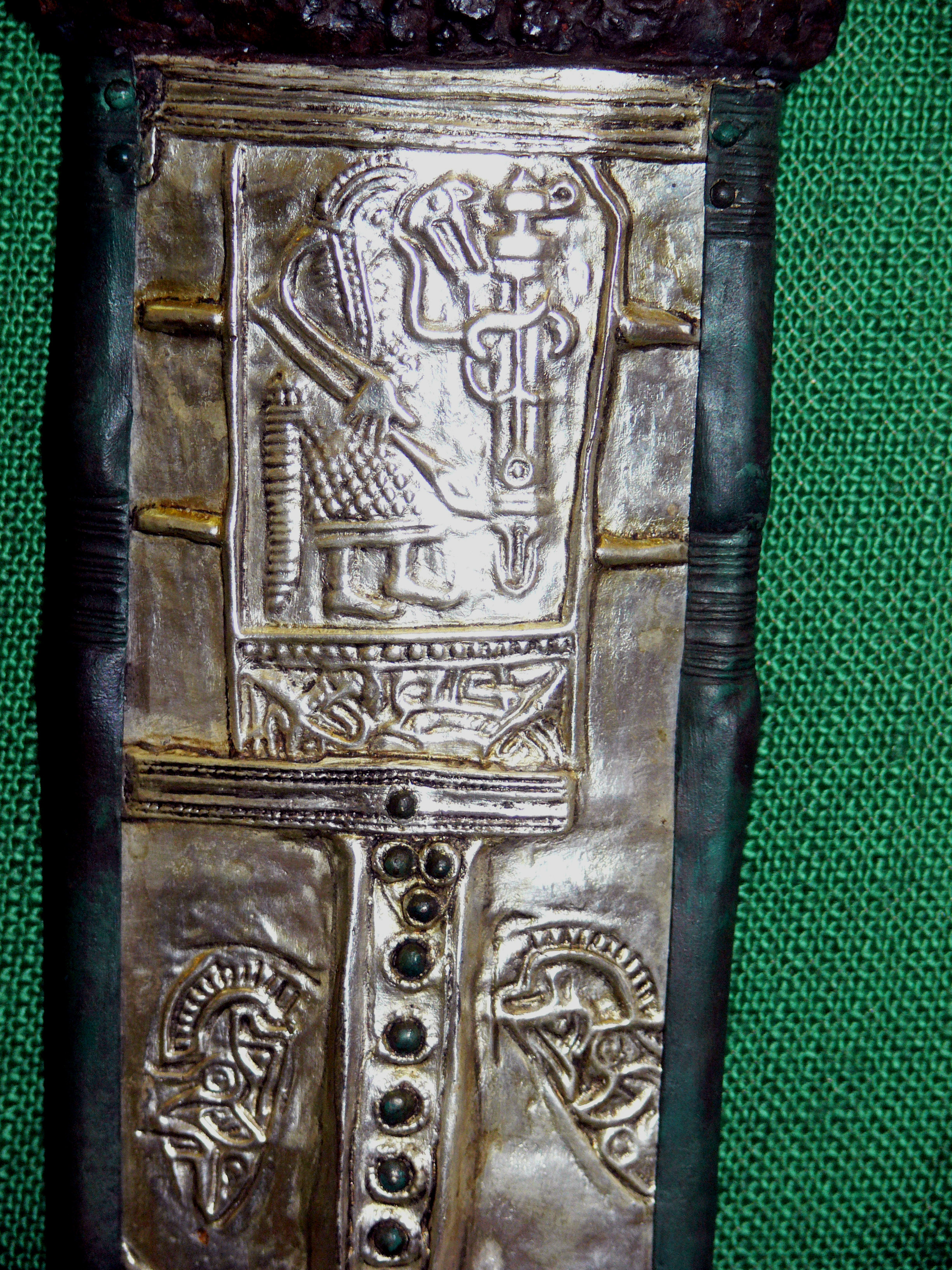 Wolfskrieger. Schwertbeschlag von Gutenstein. Replik im Römisch-Germanischen Museum in Mainz. (Original im Puschkinmuseum Moskau).